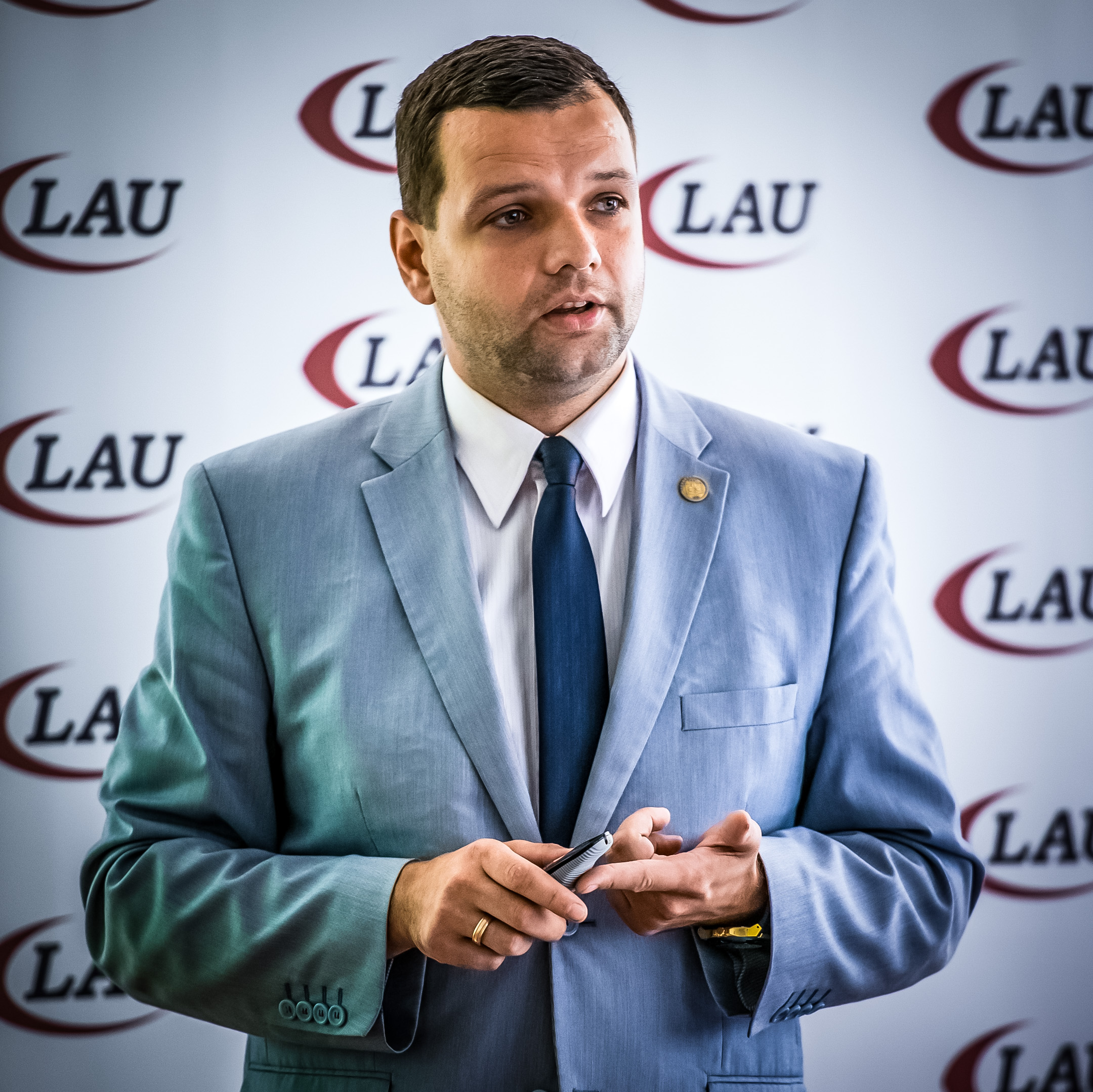 Latvijas Zemnieku savienības(LZS) valdes loceklis un LZS jaunatnes nodaļas vadītājs. Satiksmes ministra padomnieks - Reinis Uzulnieks